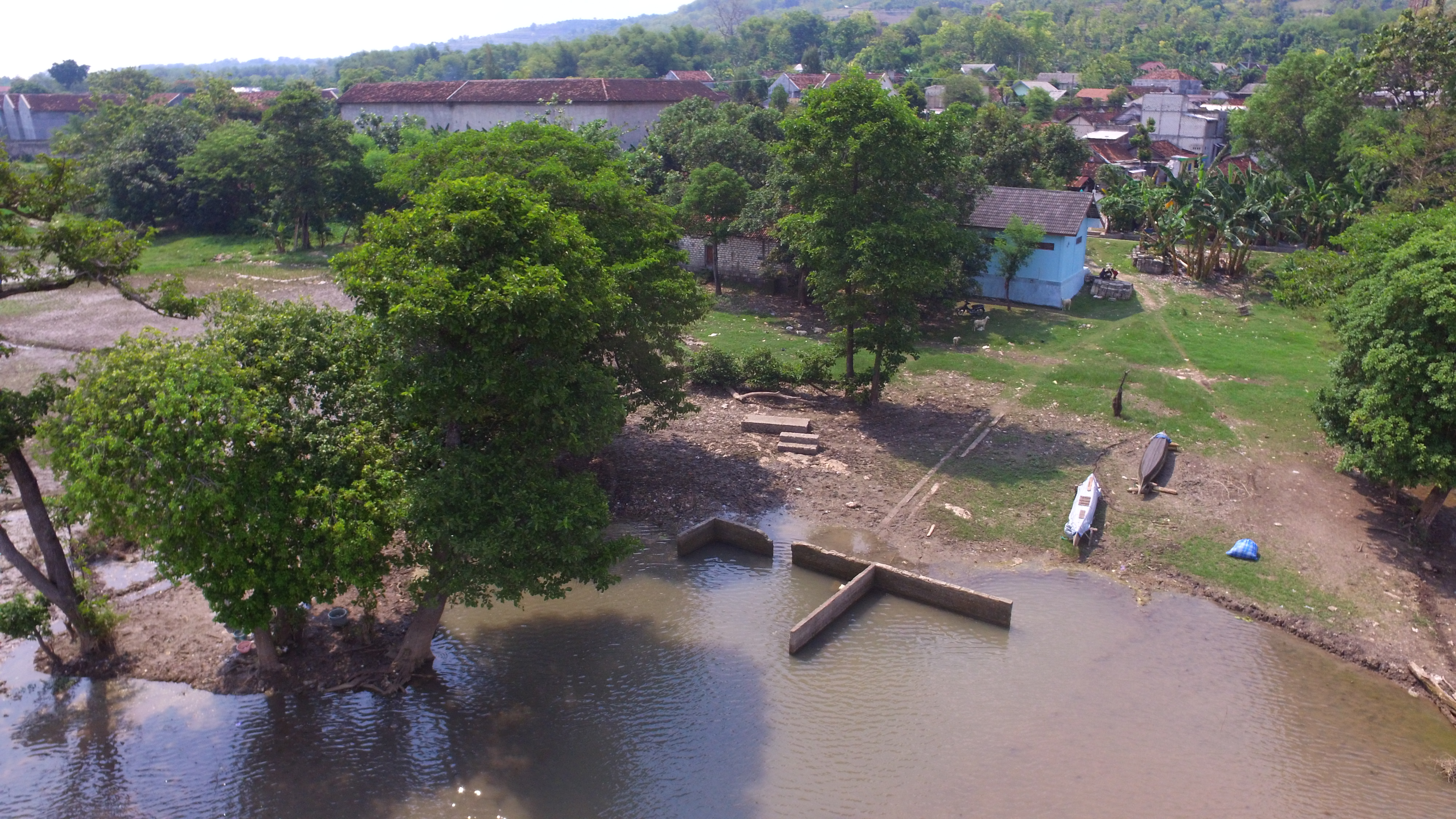 Sendang Lohgawe berasal dari sumber mata air yang besar, bagi masyarakat sekitar keberadaan sendang ini sangat dibutuhkan terutama penghasil ikan tawar, namun karena kurangnya kesadaran masyarakat kejernihan sendang lohgawe kini tidak tampak lagi, semoga sendang lohgawe bisa dijaga demi anak cucu kita kelak